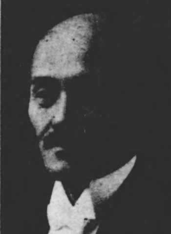 湊季松（1876～1983）